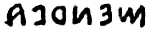 Inscription Menrva on a bronze Mirror from Chiusi (Berlin, Staatliche Museen, Antikensammlung)